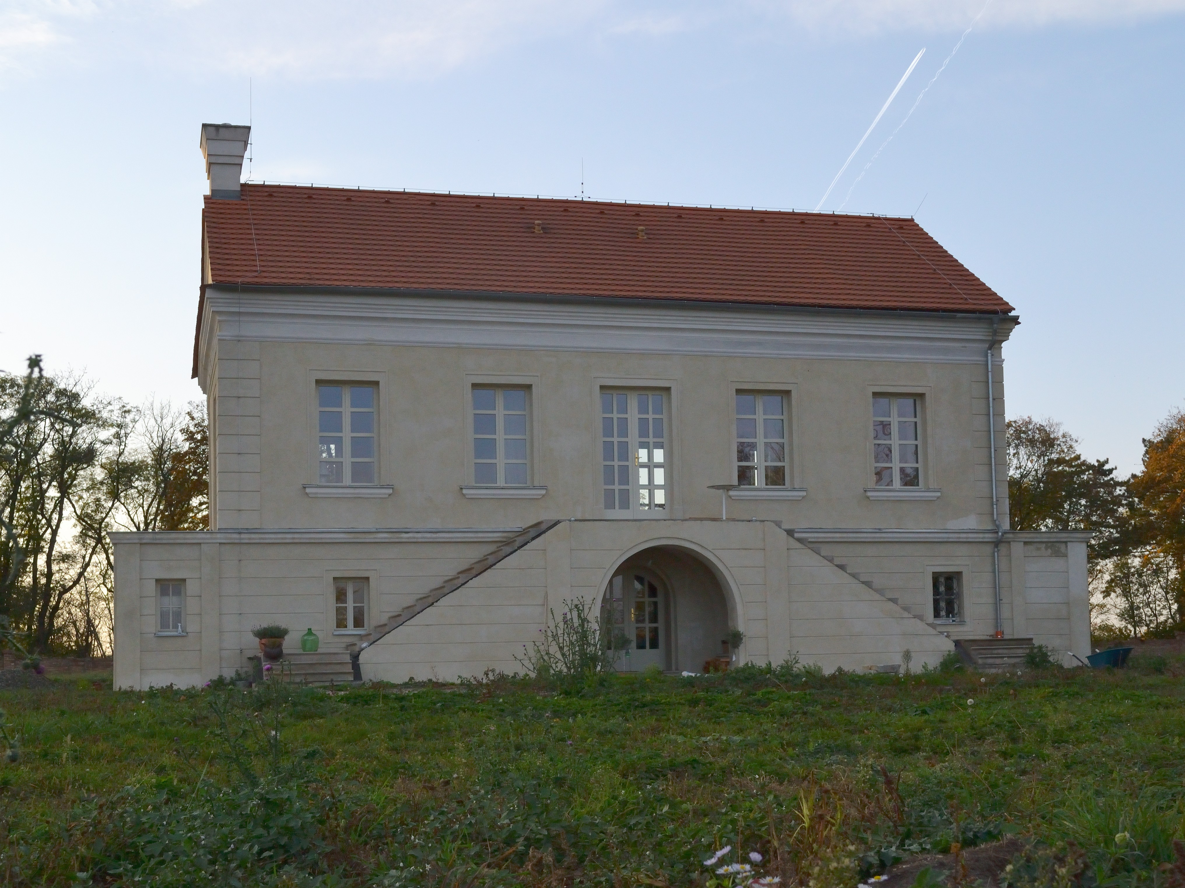 Mikulov - letohrádek Portz, pohled od východu